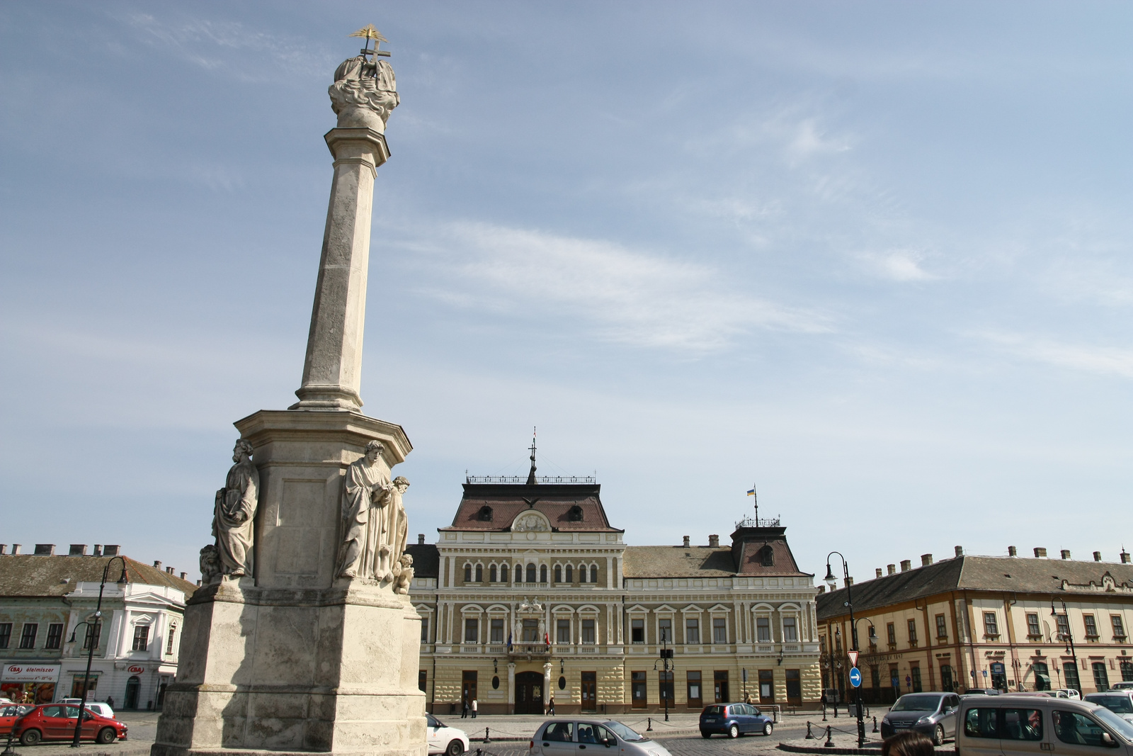 Szentháromság-szobor (Baja, Szentháromság tér)